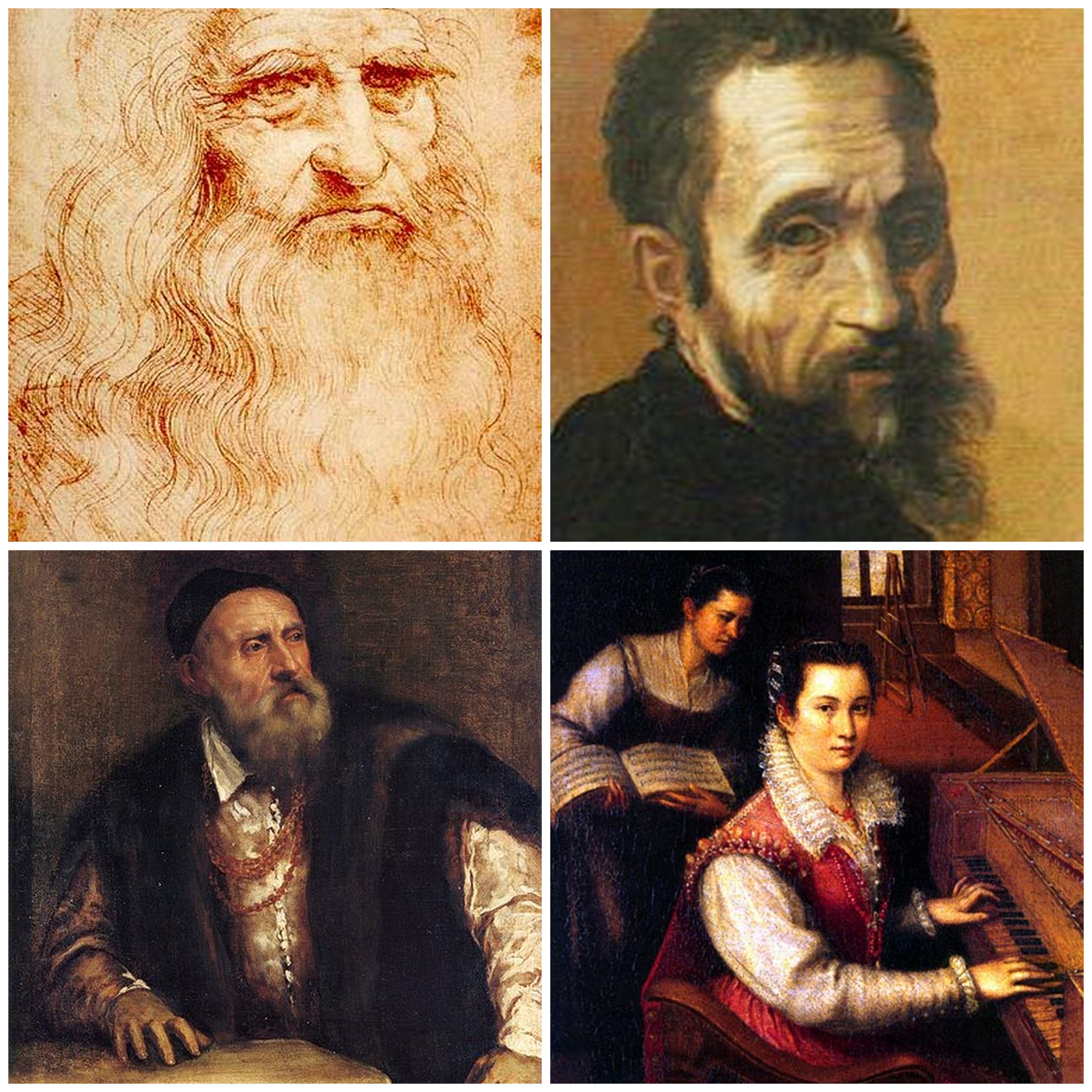 Collage di quattro foto su pittori italiani.